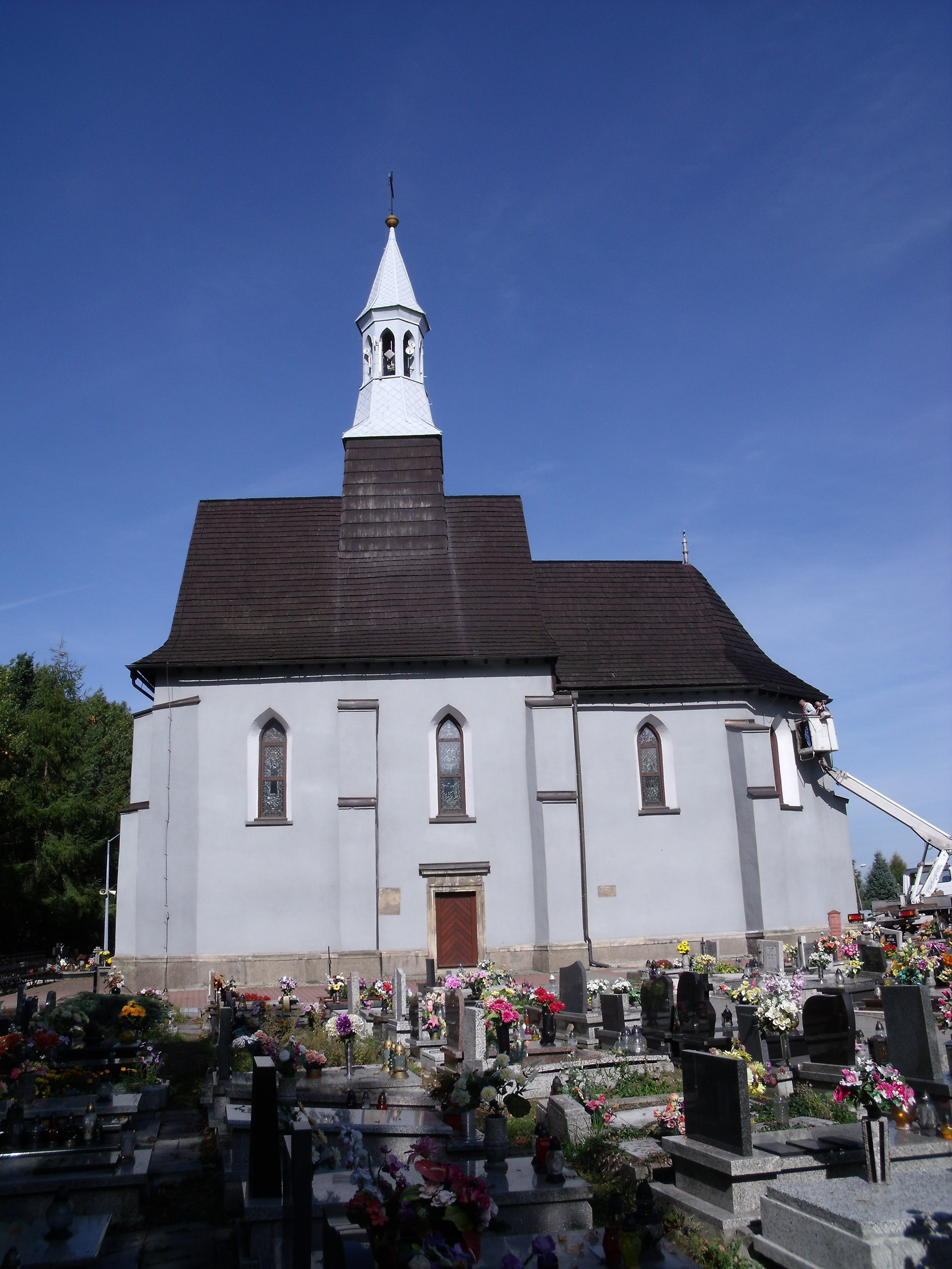 Orzesze, ul. Wawrzyńca 15a - kościół parafialny pw. św. Wawrzyńca (zabytek nr A/673/66 z 28.05.1966)